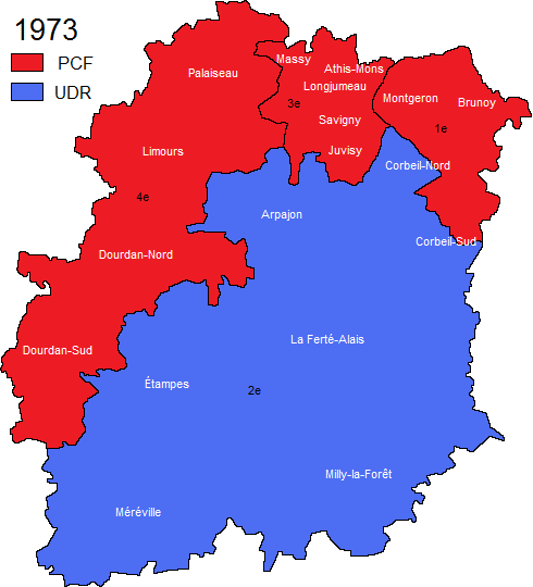 Carte électorale des circonscriptions de l'Essonne (91) en 1973.